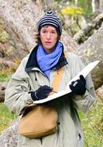 Aude Picault, Patagonie,Dessin,Nature